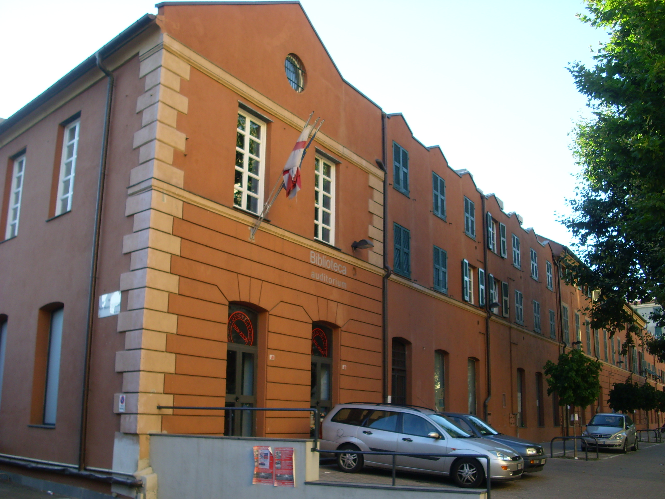 L'ex Manifattura tabacchi di Sestri Ponente, ora sede degli ambulatori della ASL e della biblioteca pubblica.